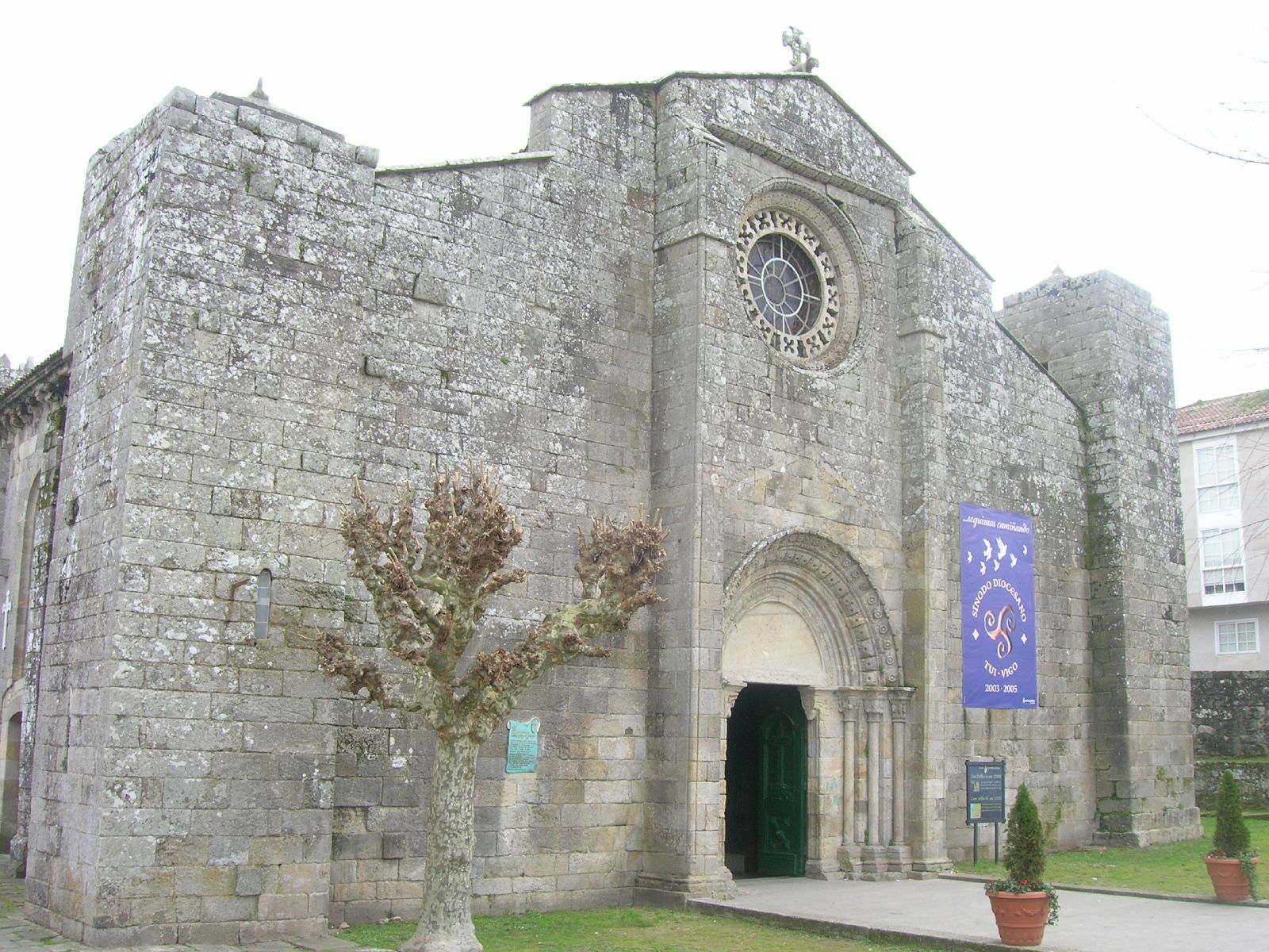 De estilo ojival románico, la Colegiata de Santa María de Baiona fue construida en el siglo XIII, alcanzando la categoría de Colegiata en 1482 bajo el mandato del Obispo Diego de Muros, rango que mantuvo hasta 1850.